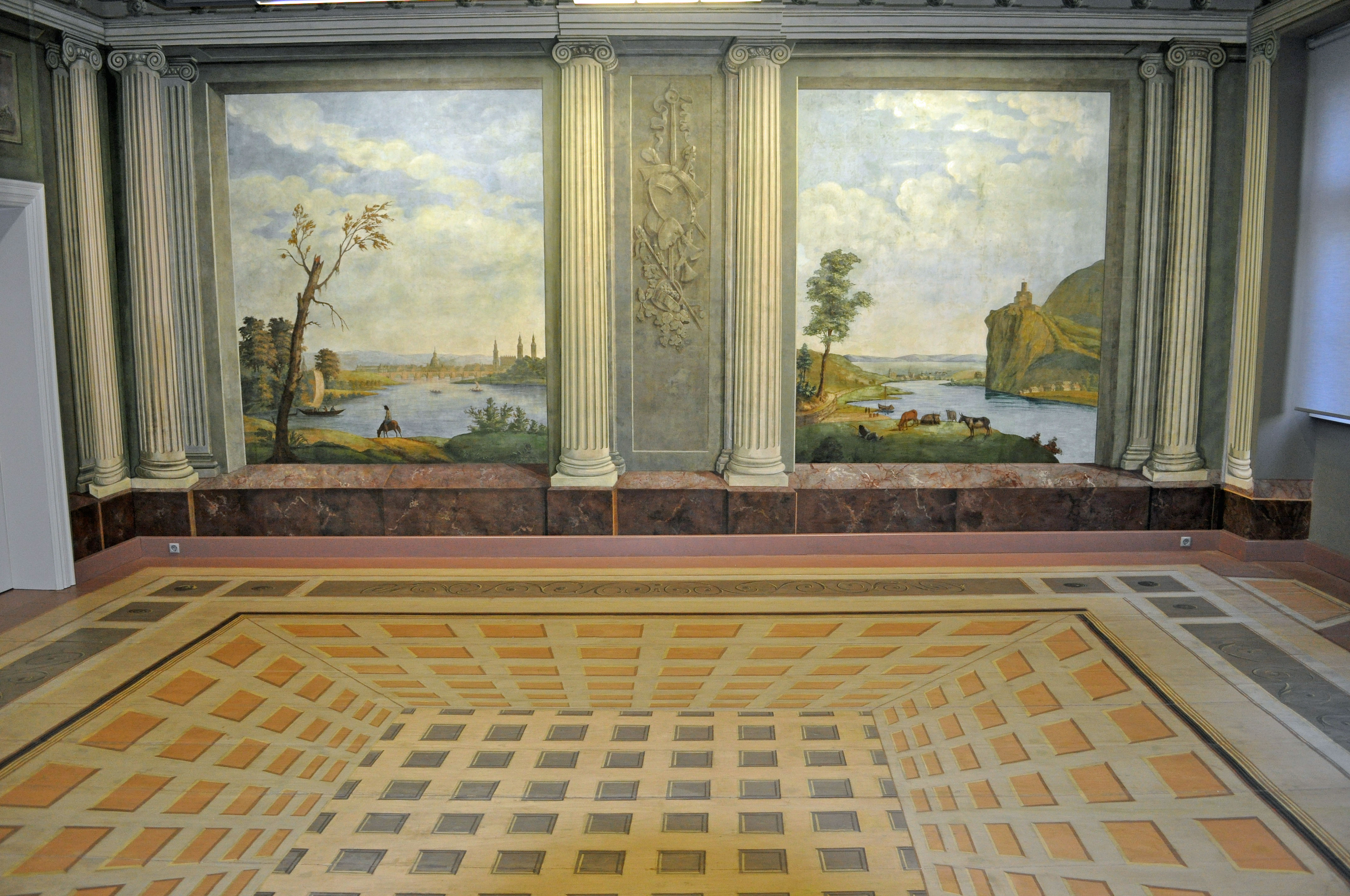 Haus Ossenreyerstraße 1 in der Stadt Stralsund. Aufgenommen am 6. September 2011 vom Benutzer:Klugschnacker. Das Foto zeigt den so genannten Hackert'schen Tapetensaal im Haus Ossenreyerstraße 1 in der Stadt Stralsund. Der Saal wurde 1762 durch Jakob Philipp Hackert mit Landschaftsmalerei auf Tapete gestaltet.